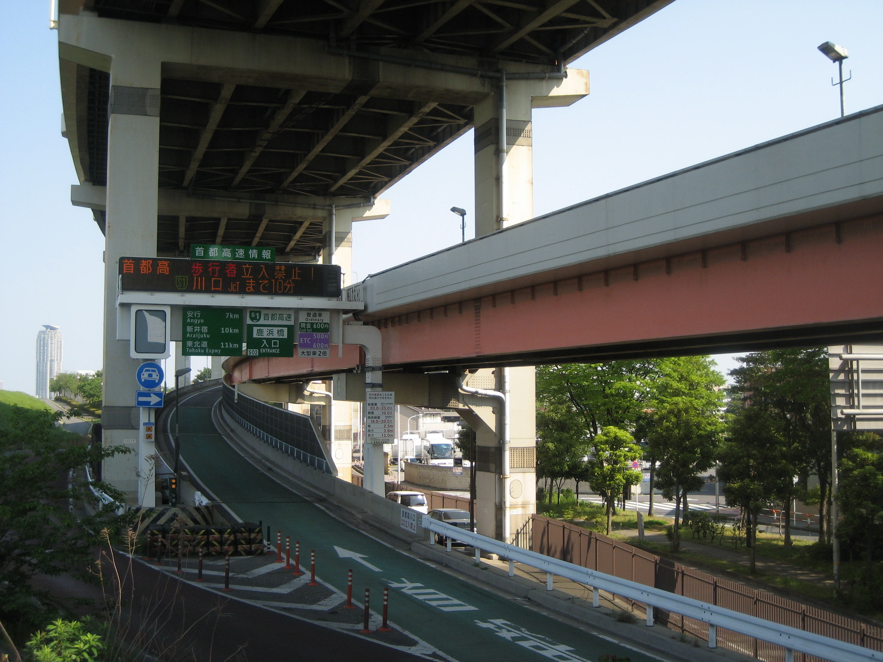 首都高速川口線鹿浜橋入口（都道107号線側の入口）